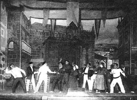 Fotografía de una escena de la representación de la zarzuela El caserío, estrenada durante la temporada 1926-1927.